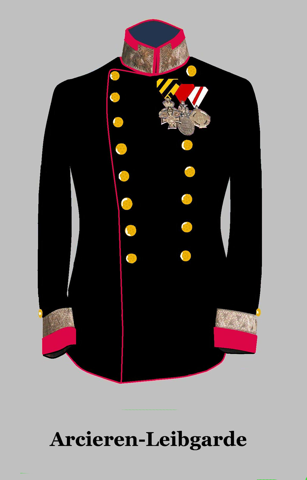 Gardeleutnant (Oberst), Waffenrock k.u.k. Arcièren-Leibgarde